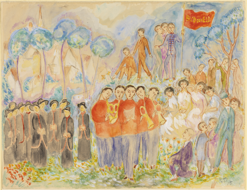 Nils Dardel 1888 - 1943 Frankrike, Född Sverige Frälsningsarmén, 1915 The Salvation Army Akvarell och blyerts på papper 24,5 x 31,8 cm Teckning Donation 1966 i testamente från Rolf de Maré